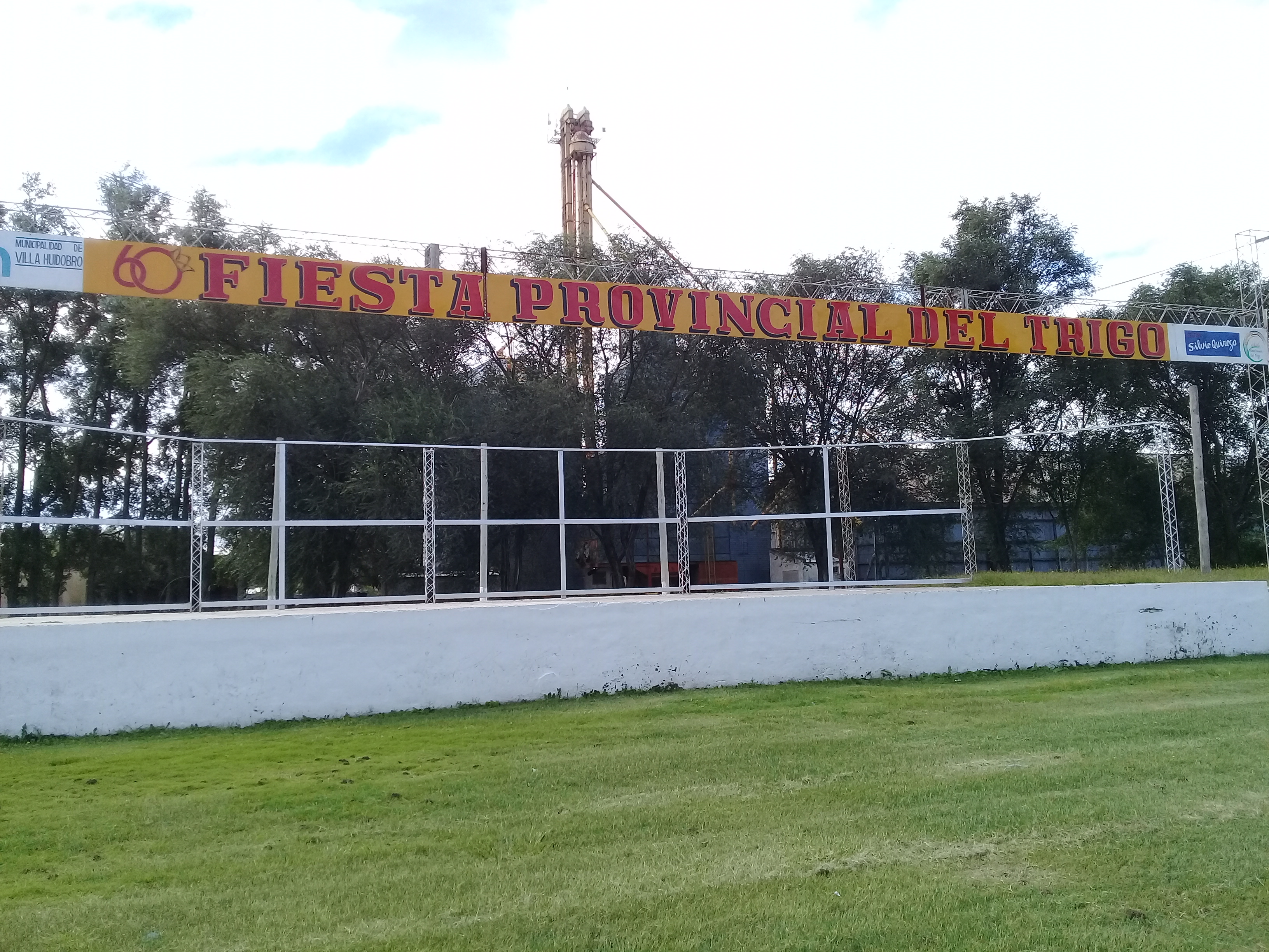 Este escenario fue construido en el predio del FFCC para el desarrollo de la Fiesta Provincial del Trigo que anualmente se desarrolla en la localidad de Villa Huidobro. Su nombre es un homenaje al reconocido locutor local Roberto Berola que durante tres décadas colaboró con la realización de la Fiesta.